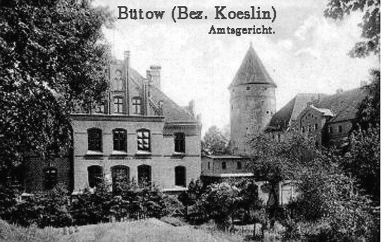 Bytów, ul. Zamkowa 1 - budynek sądu rejonowego Das Amtsgericht in Bytów in Pommern um 1900